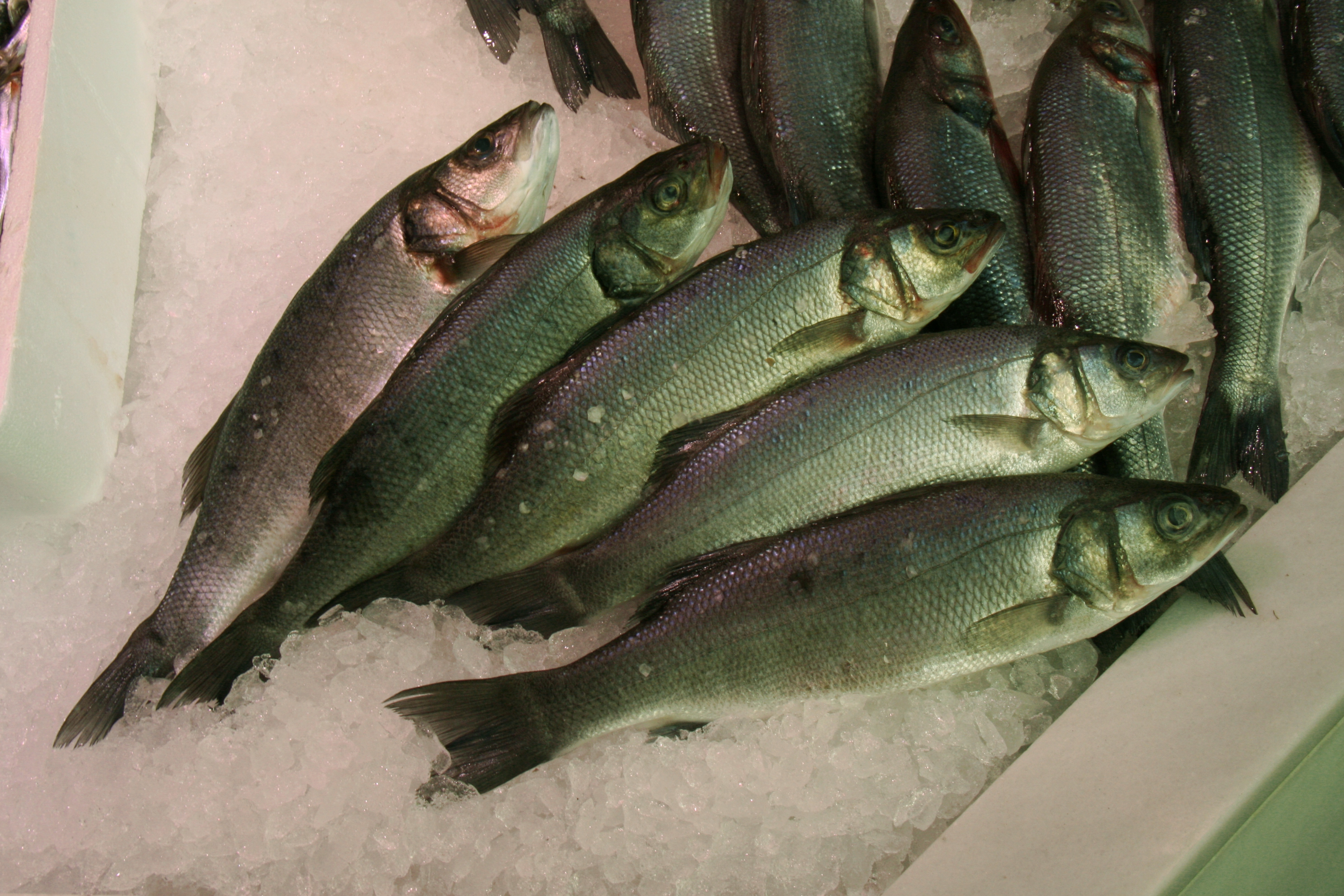 Lubinas frescas